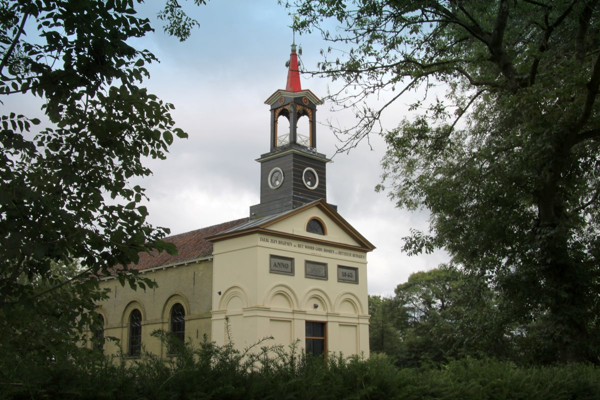 Het mooie kerkje van Terband bij Heerenveen in Friesland. Het is al van verre te zien vanaf de A7 door zijn opvallende rode spits